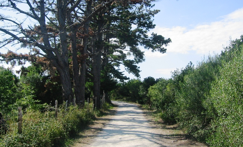 Ile d'Aix, France.